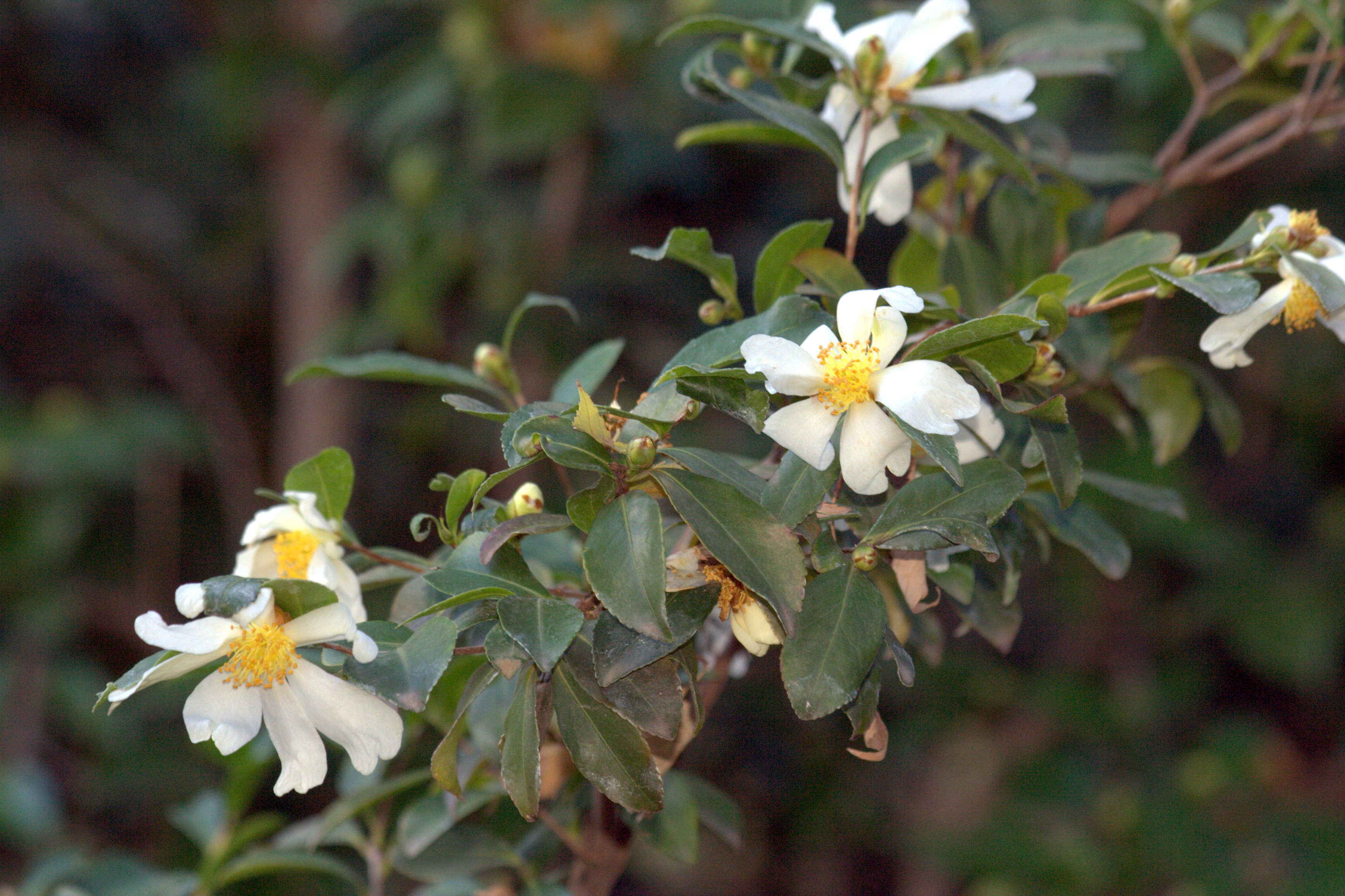 Fotografía obtenida en el Real Jardín Botánico de Madrid de las flores y hojas de Pyrenaria microcarpa